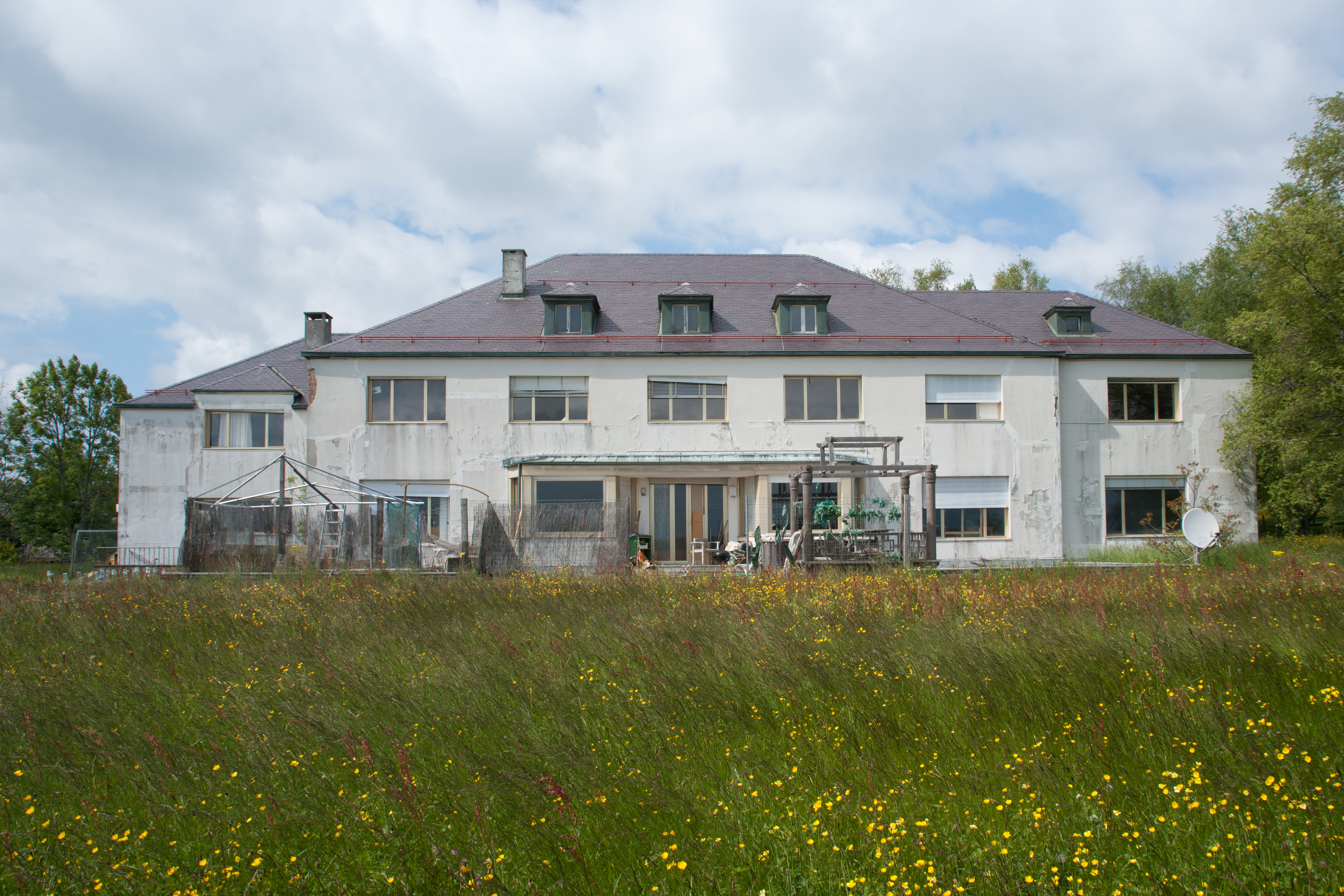 Maison de George Simenon - Epalinges (CH)